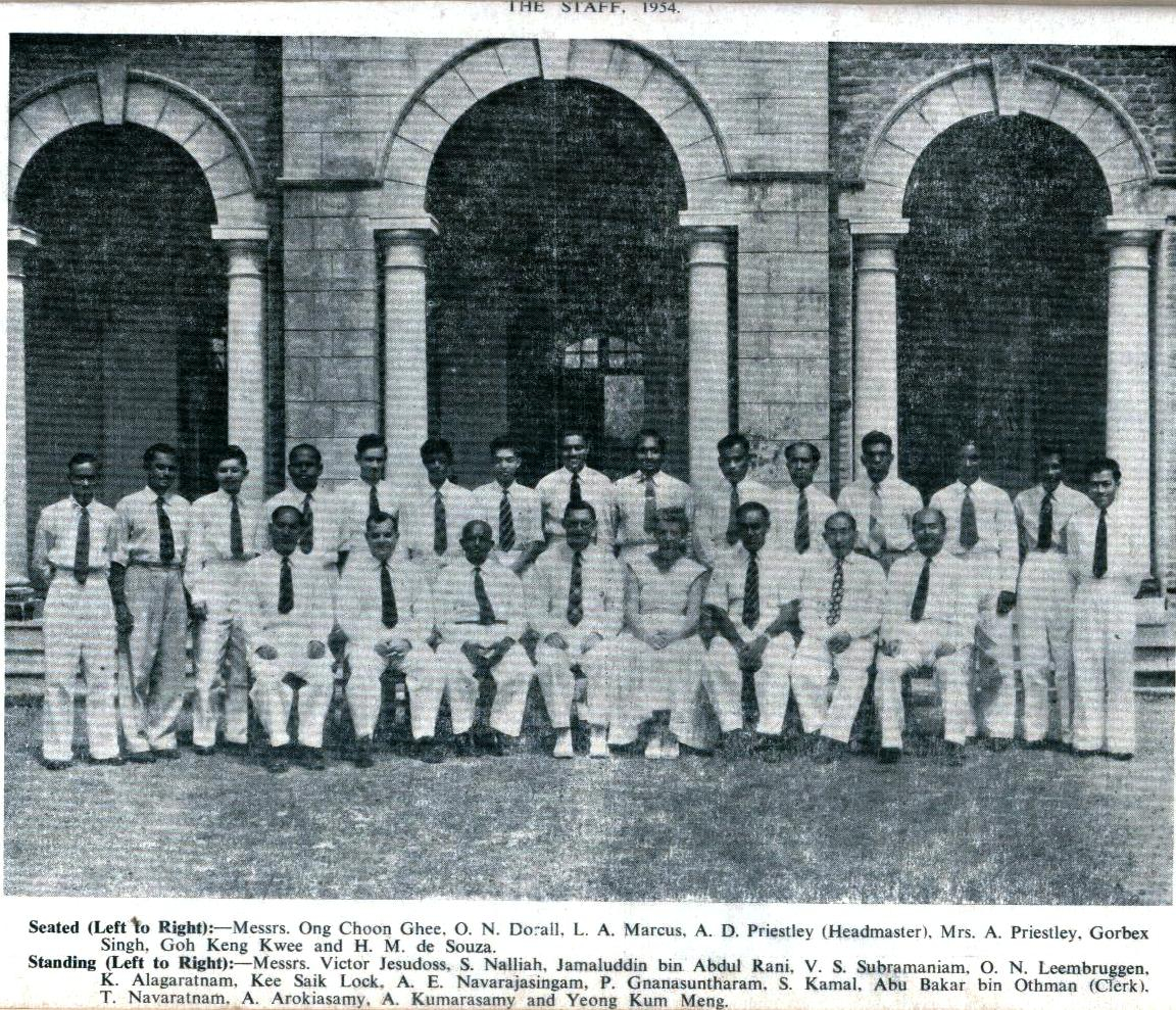 Tenaga Pengajar, 1954